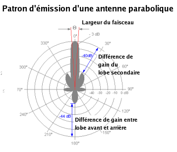 Antenna diagram